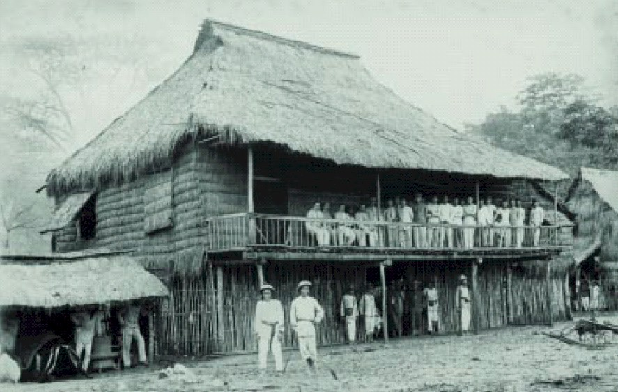 Campamento de Emilio Aguinaldo en Biak-na-Bato